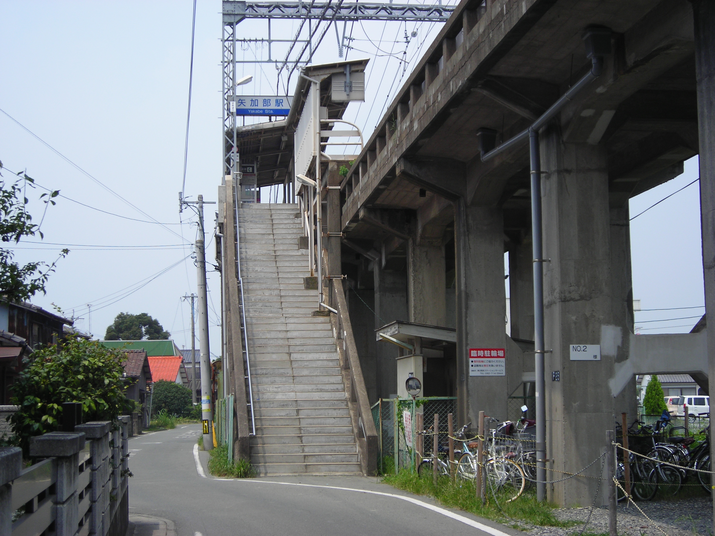 矢加部駅（2007年7月投稿者撮影）